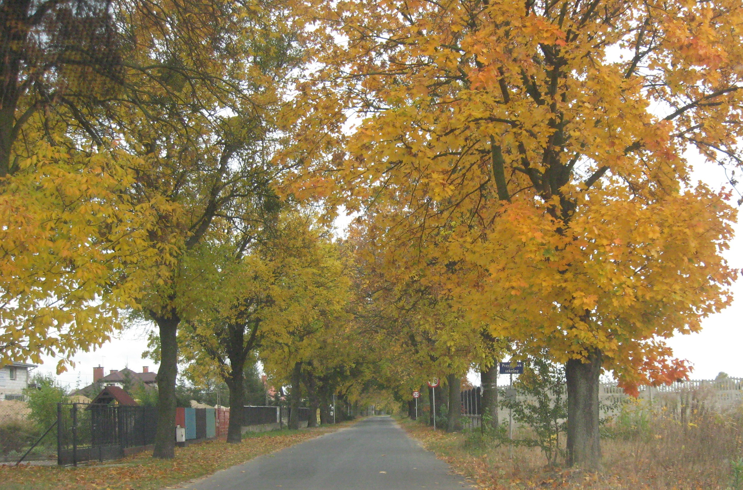 Ulica Polna we wsi Marianów w gminie Leszno (pow. warszawski-zachodni), widok w kierunku Leszna